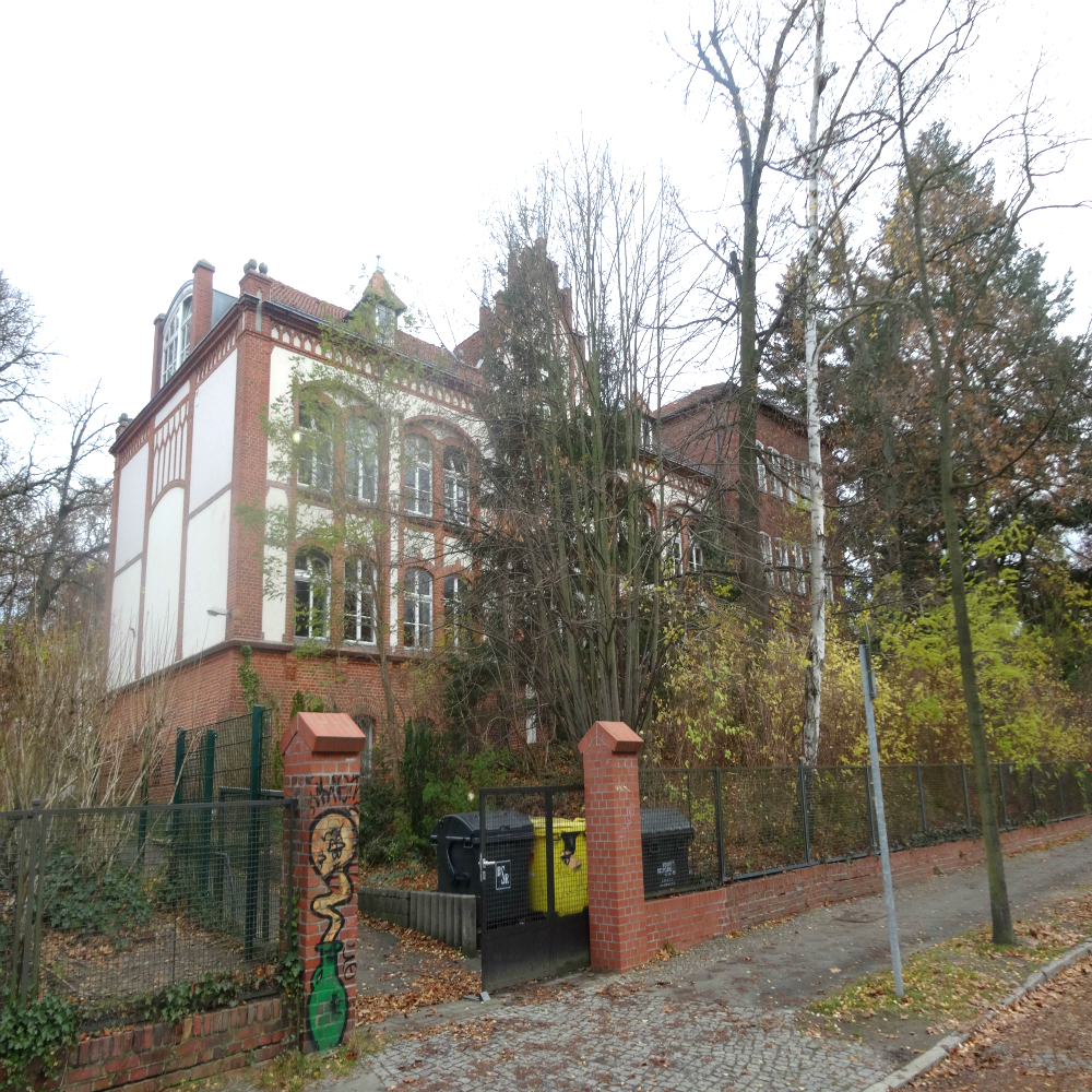 Münchhausen-Grundschule Außengebäude